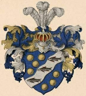 Maydelli suguvõsa aadli- ja parunivapp